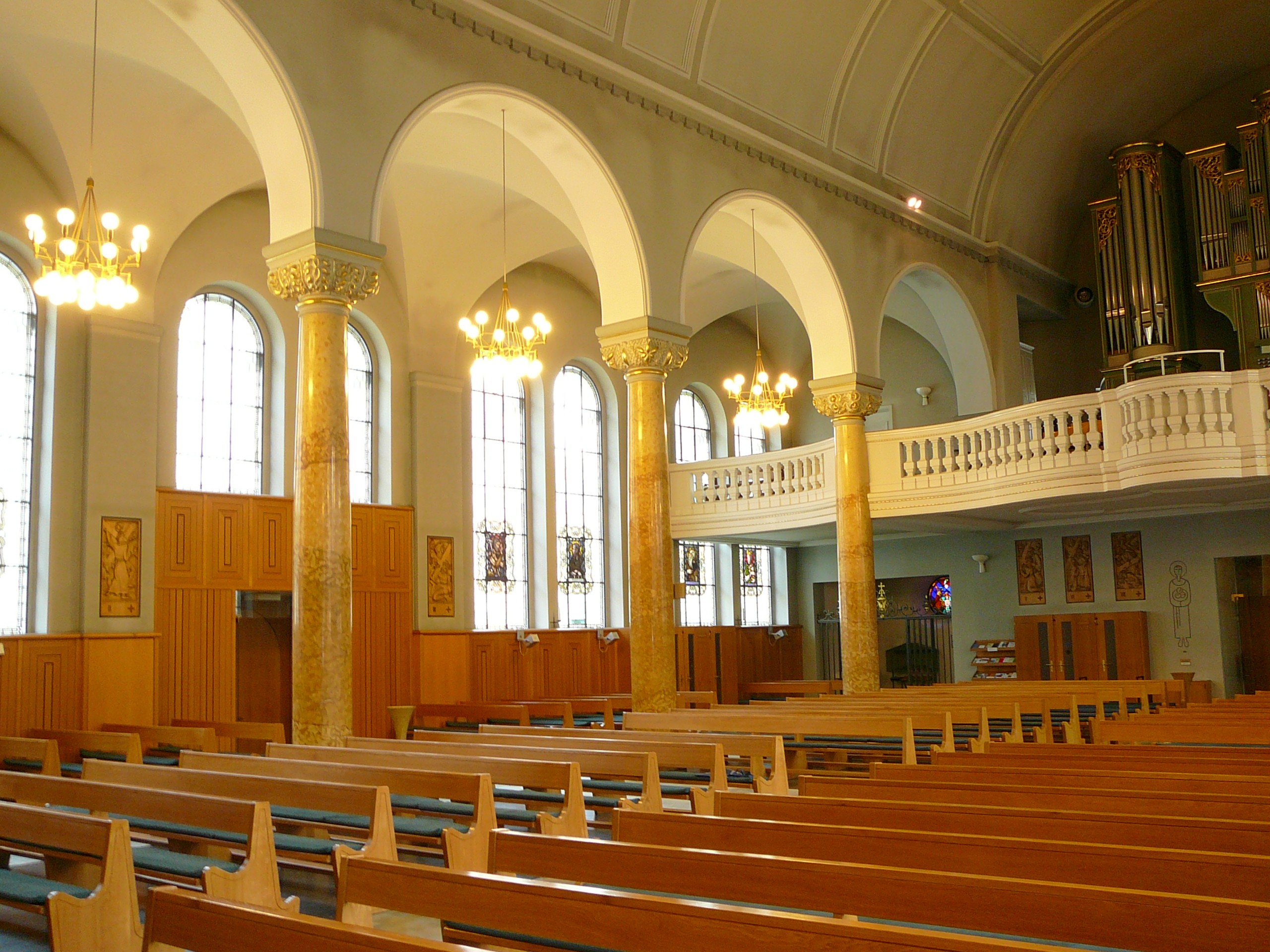 Römisch-katholische Kirche St. Josef Zürich-Industriequartier, Blick quer